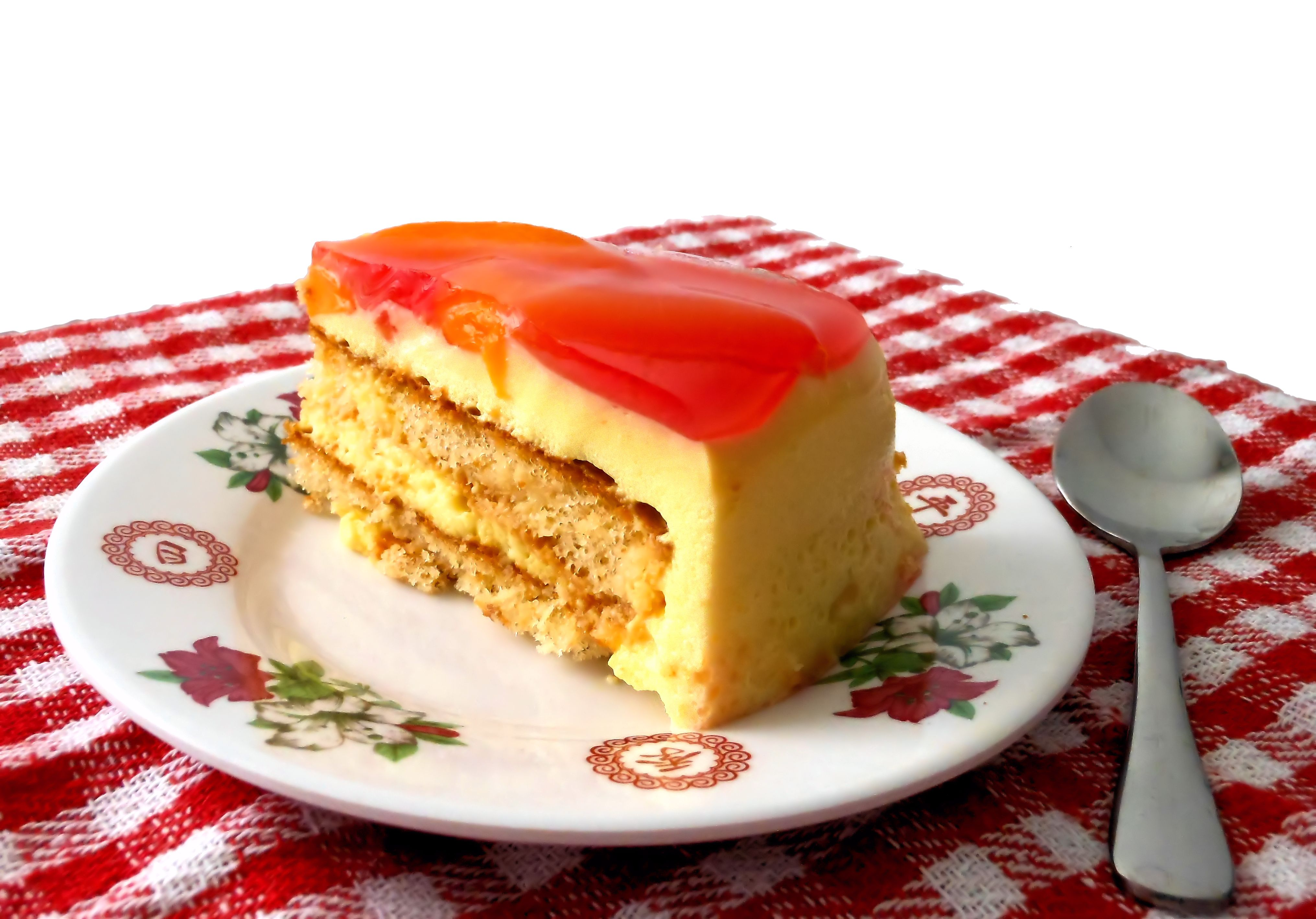 Torta helada peruana o tarta fría de gelatina